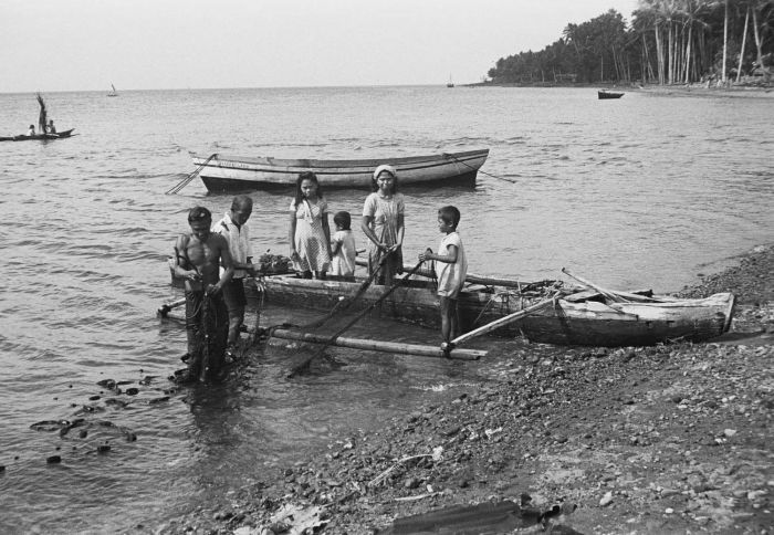 negatief. Vissersfamilie op het strand in de weer met net, Poelau Sangihe